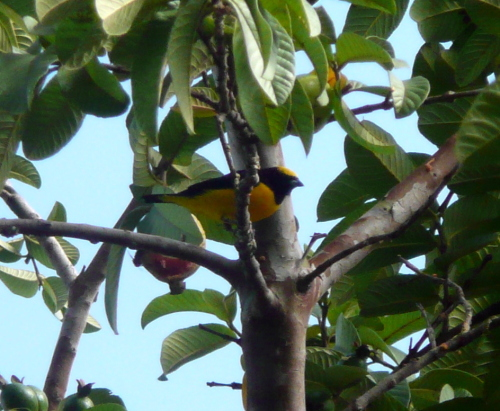 Euphonia trinitatis ♂ Lugar / Place / Lieu: Cagua, Estado Aragua, Venezuela.